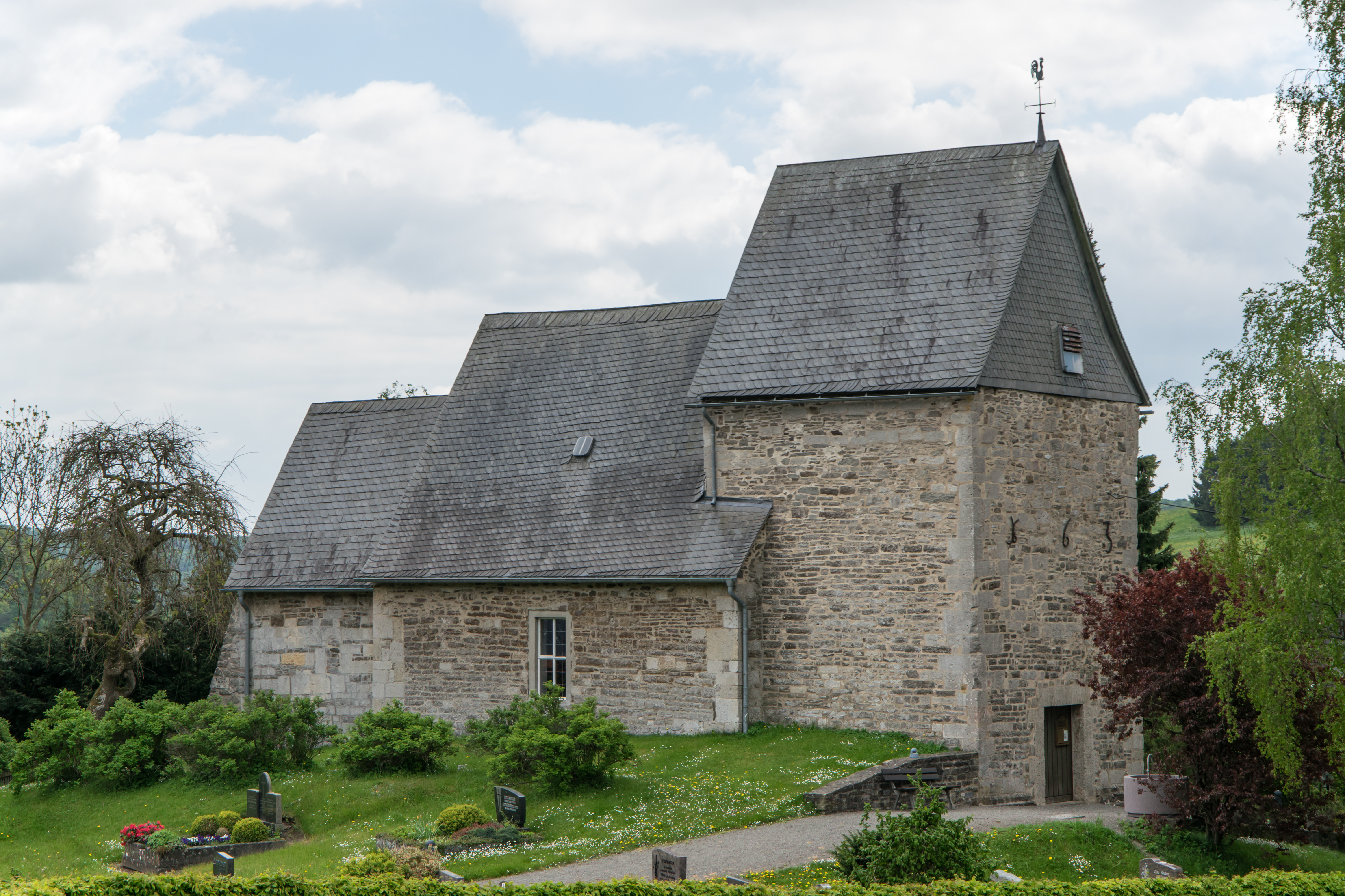 Welleringhausen Abrahamskirche von Nordwesten